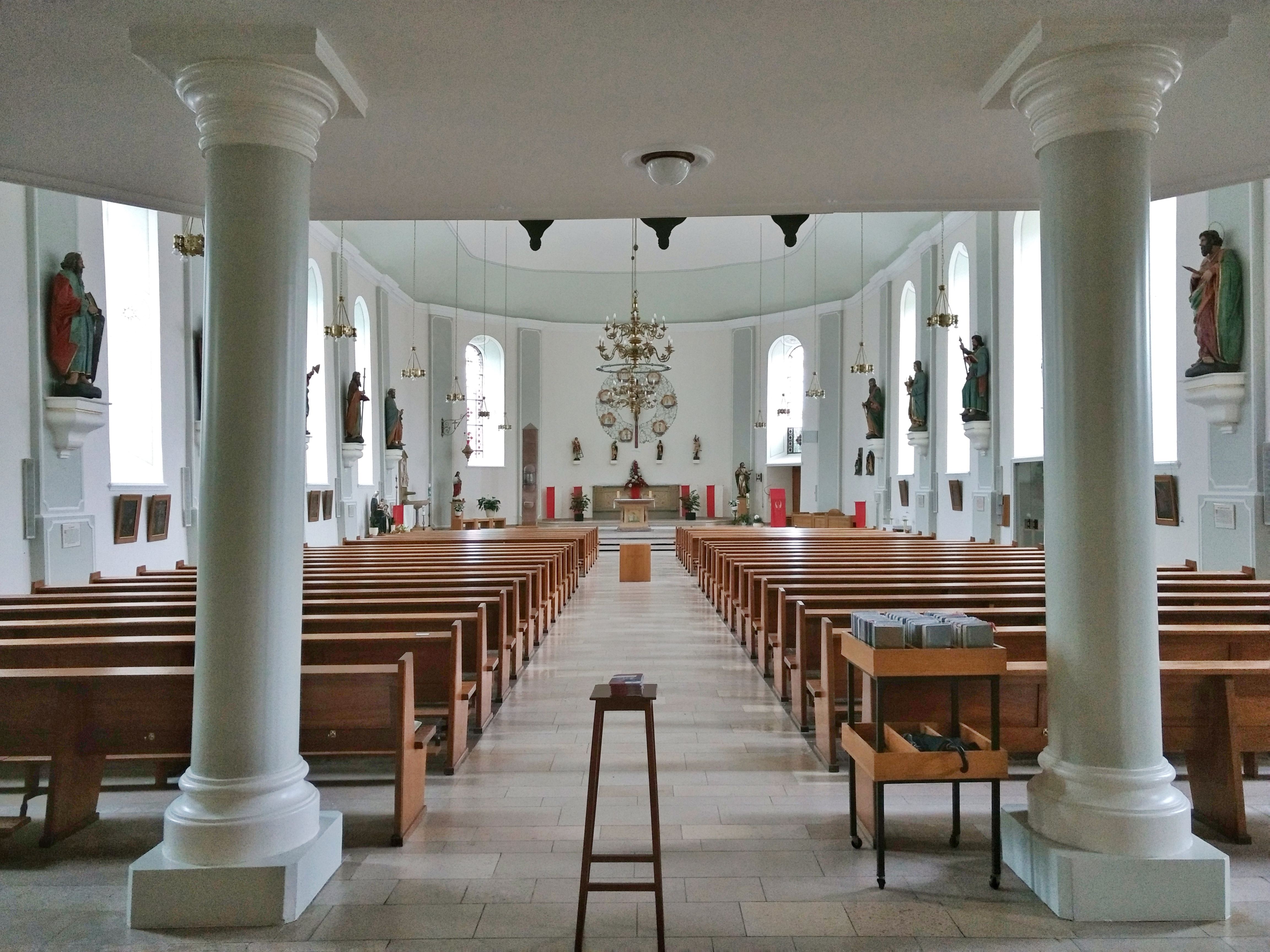 Allerheiligen Kirche Wadern